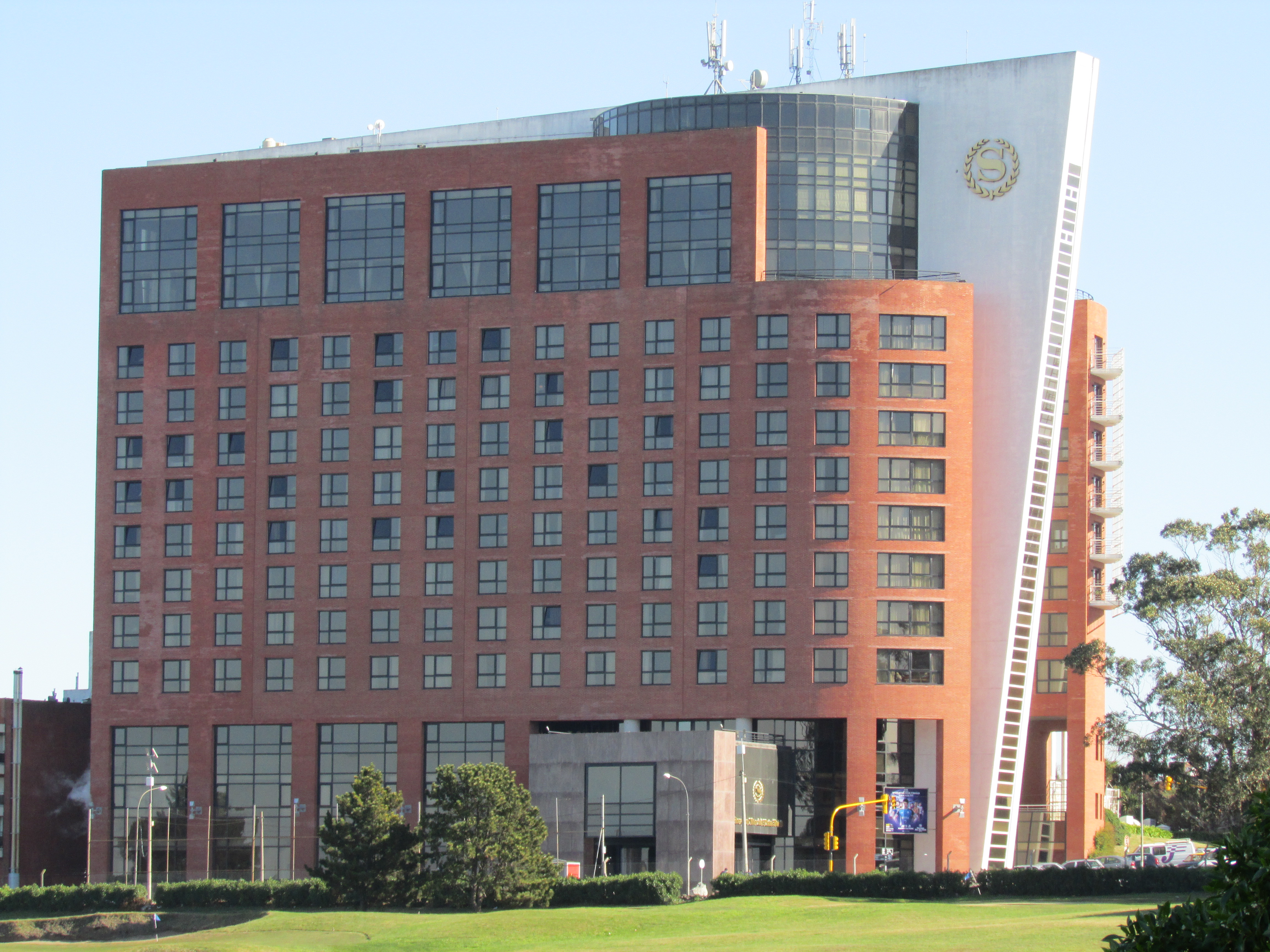 Hotel Sheraton en Mar del Plata, provincia de Buenos Aires, Argentina.